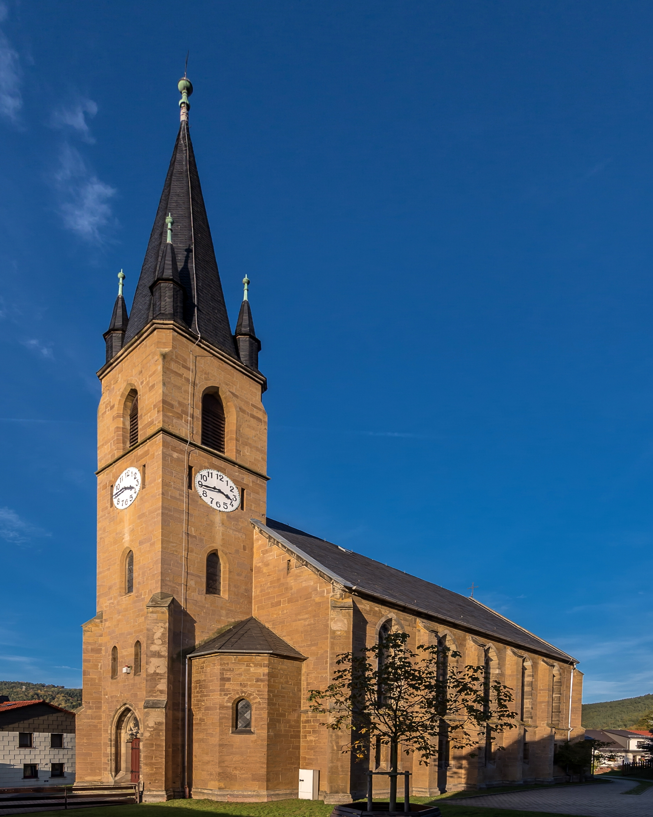 Kaulsdorf Fuhrgasse Kirche mit Ausstattung